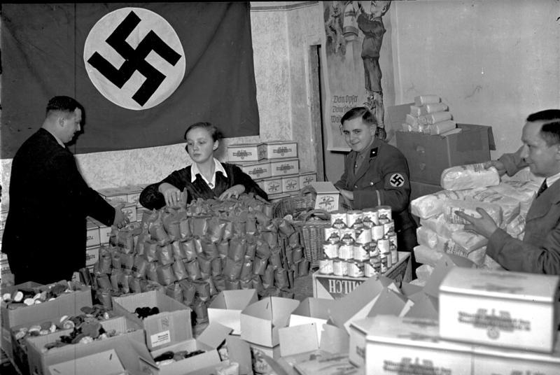 Weihnachtspakete für das W.H.W. Überall in Groß-Berlin ist die N.S.V. damit beschäftigt die Weihnachtspakete für die minderbemittelten Volksgenossen, welche dieser Tage zur Verteilung gelangen, fertig zu machen.